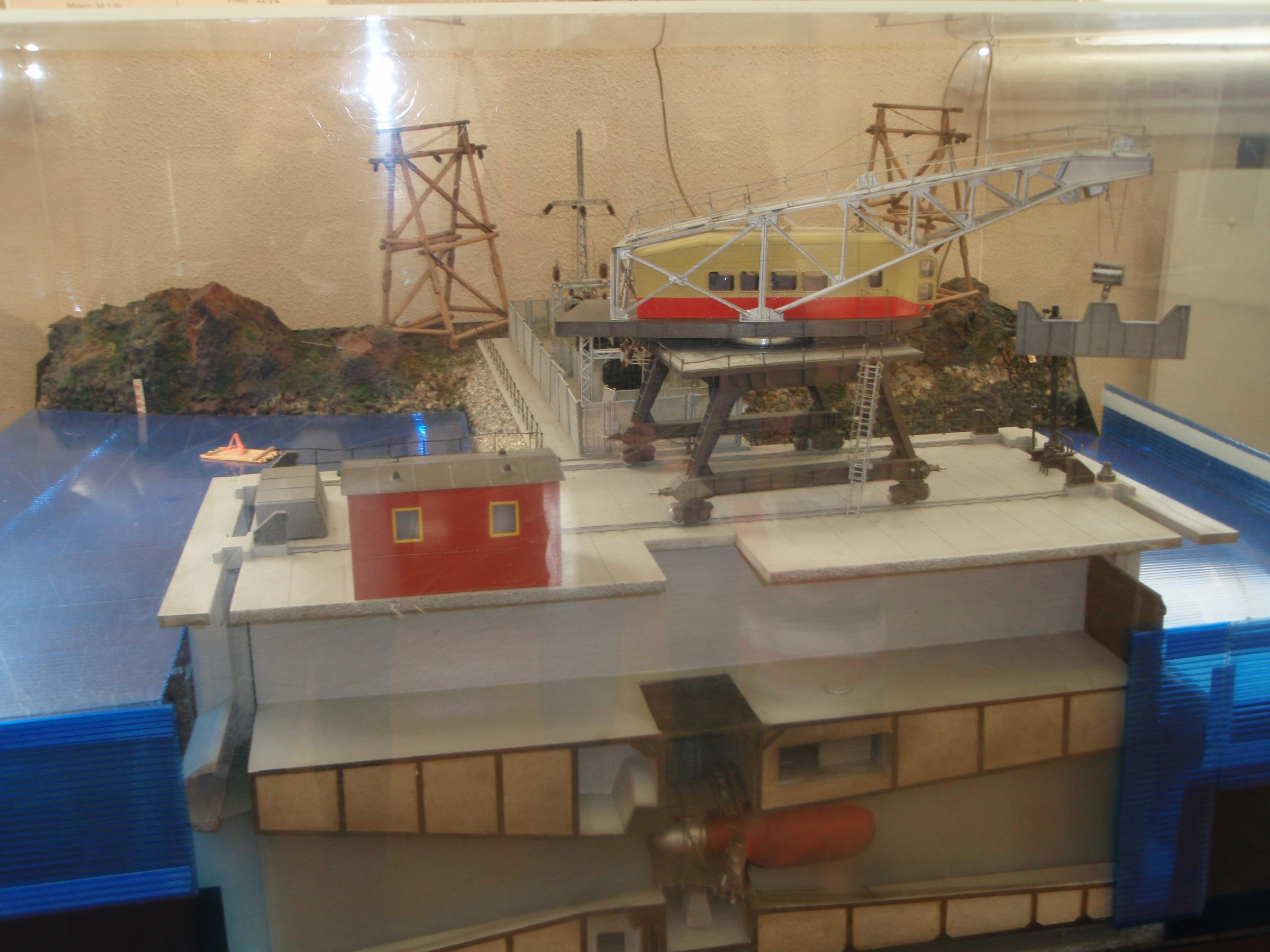 Макет Кислогубской приливной электростанции, Государственный Политехнический музей (г.Москва)